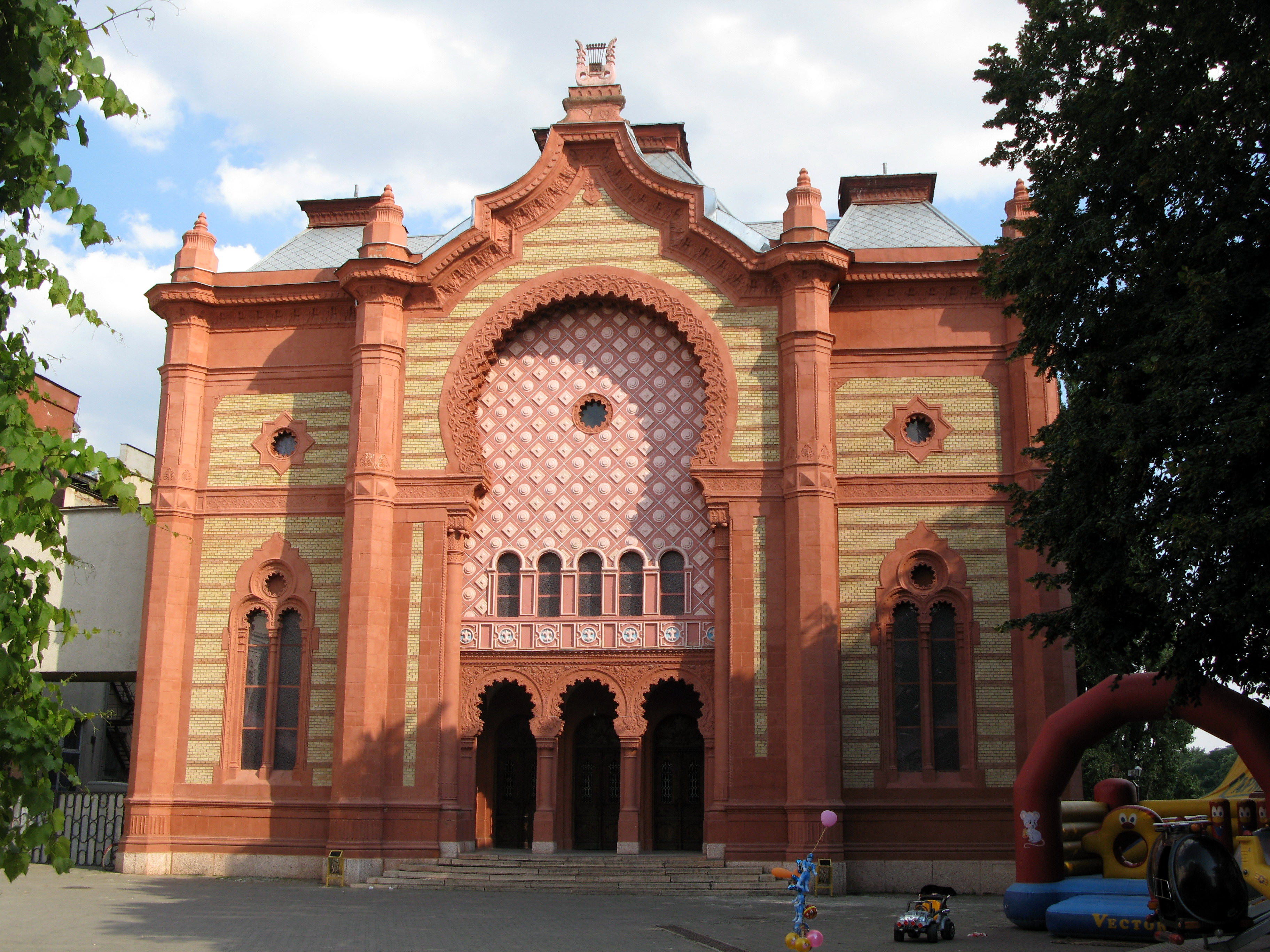 Синагога (мур.), Ужгород, пл. Театральна, 10